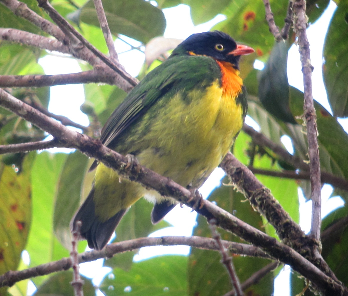 Pueblo Rico, Risaralda, Colombia ( Cerro Montezuma)